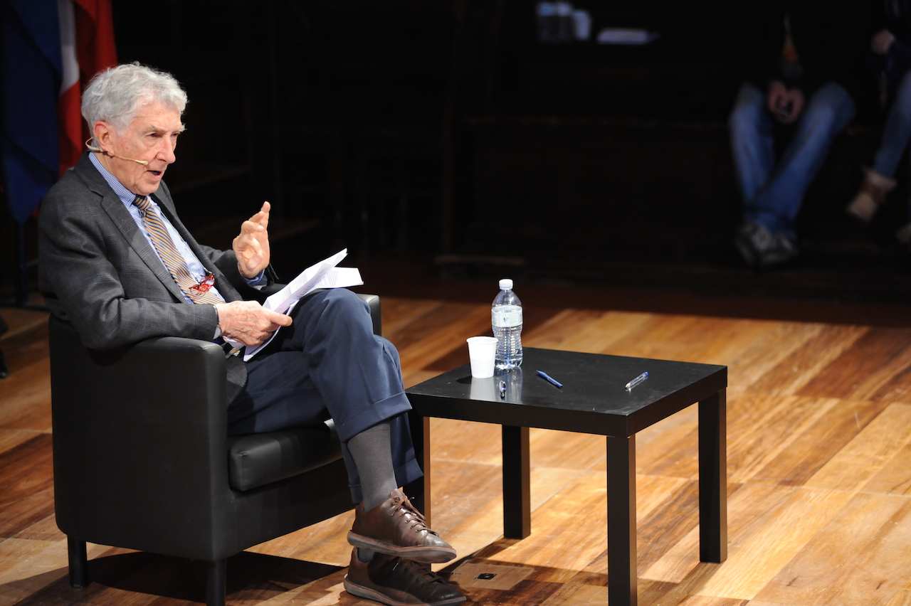 Corrado Augias. Tra Cesare e Dio. Sala dei Notari. Festival del Giornalismo di Perugia.